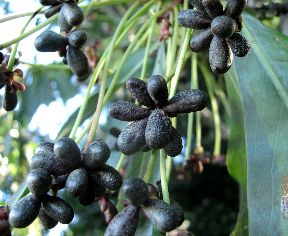 Canelo Drimys winteri, Los Rios, Chile